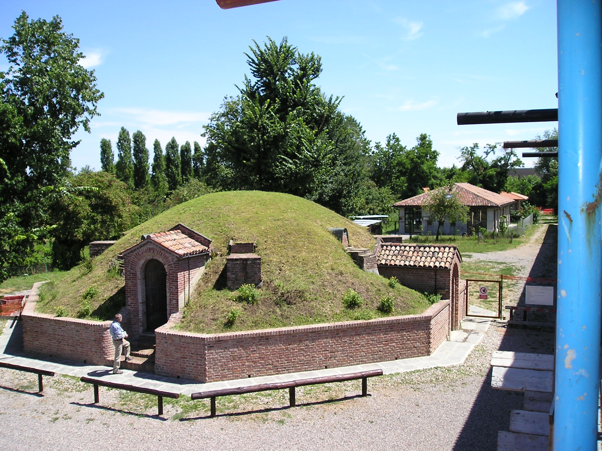 Vista della ghiaccia Favaglie restaurata - La ghiacciaia è ora parte integrante dell'Area museale e Punto Parco Agricolo Sud Milano "Cascina Favaglie"